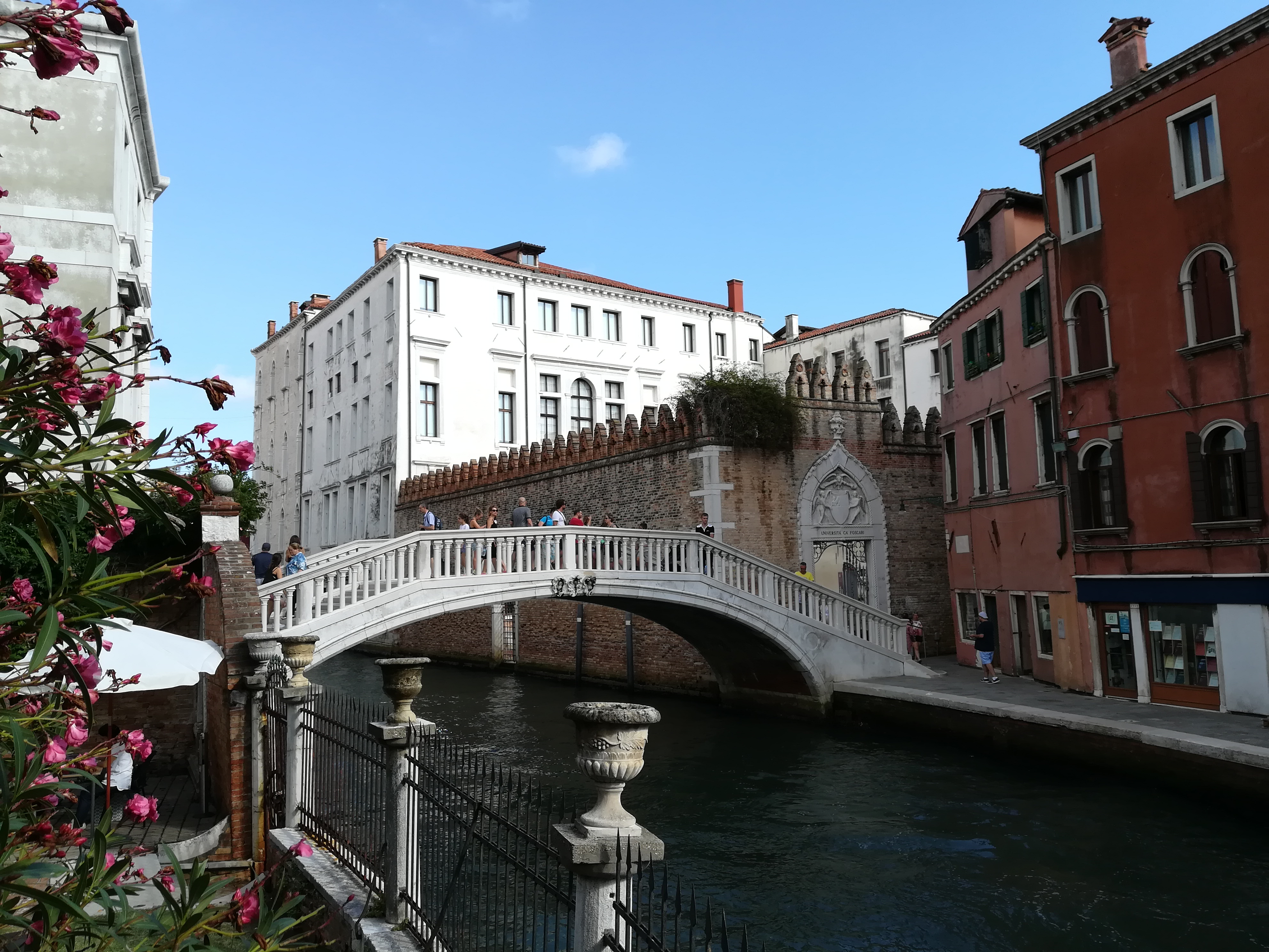 Canal in Venice and Università Ca' Foscari (Venezia)